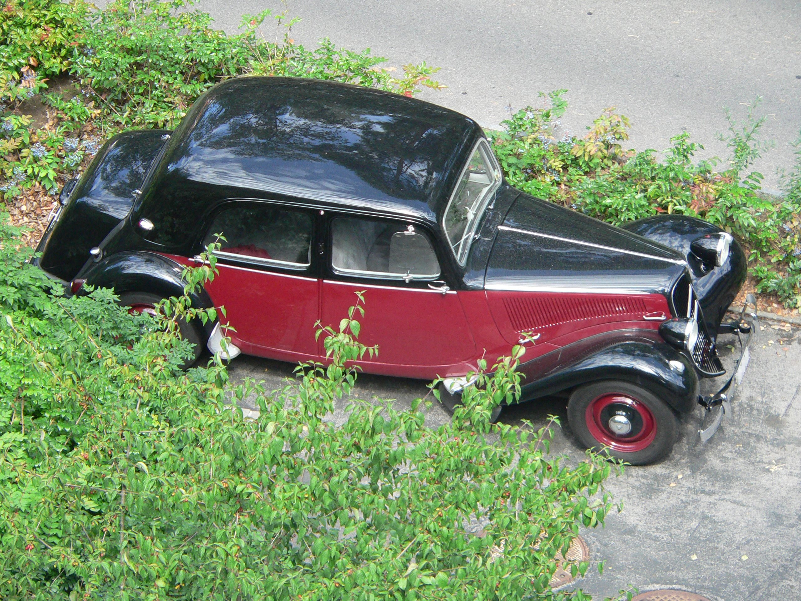 Citroen Traction Avant